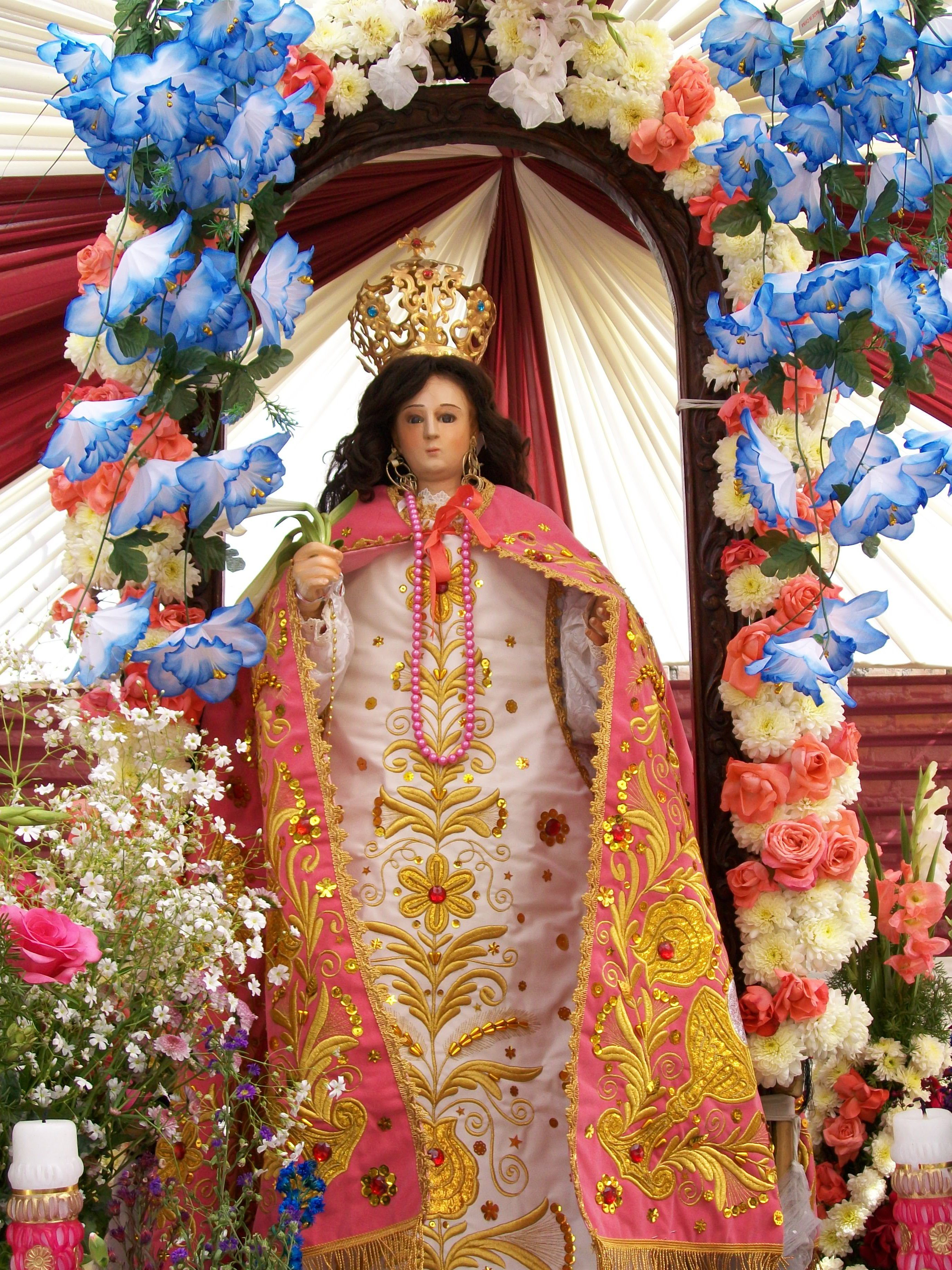 Virgen de Natividad Fiesta Costumbrista País : Perú Fotografo: © Edgar Amador Espinoza Montesinos